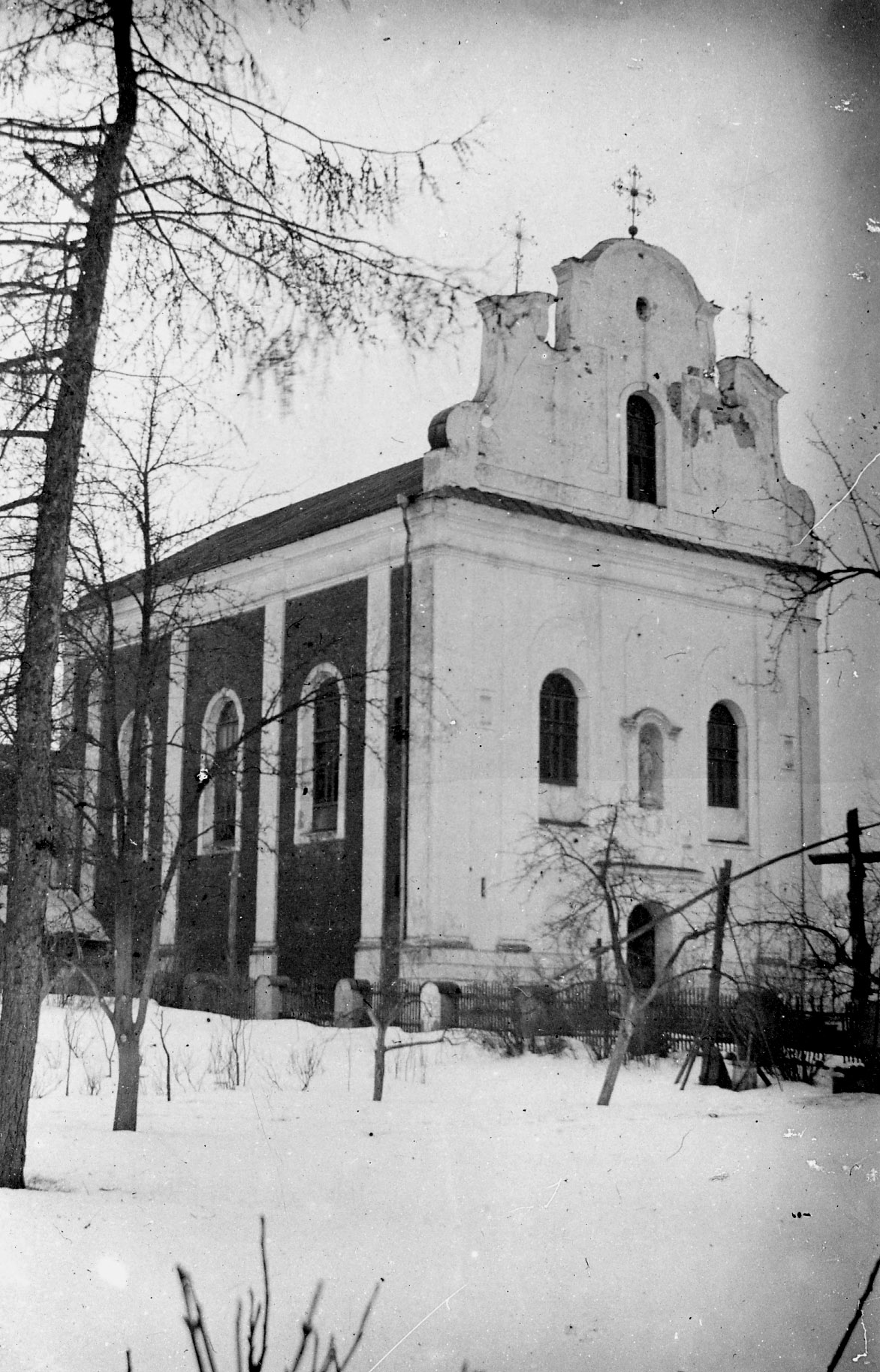 Беларуская (тарашкевіца): Дзісьна (Dzisna), вуліца Касьцельная (vulica Kaścielnaja). Касьцёл Беззаганнага Зачацьця Найсьвяцейшай Панны Марыі пры кляштары францішканаў